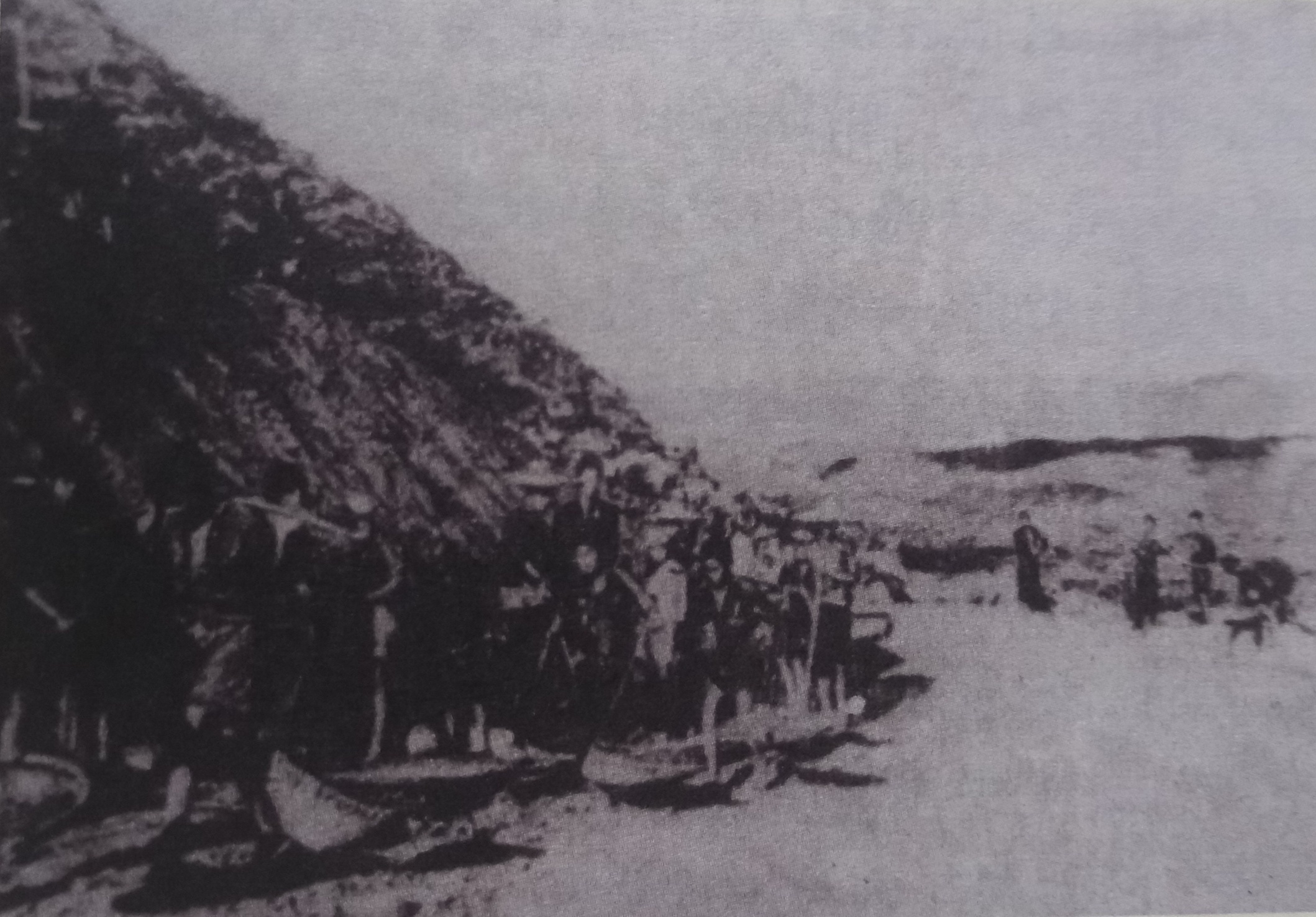 中文（中国大陆）: 1937年潞西县修筑滇缅公路